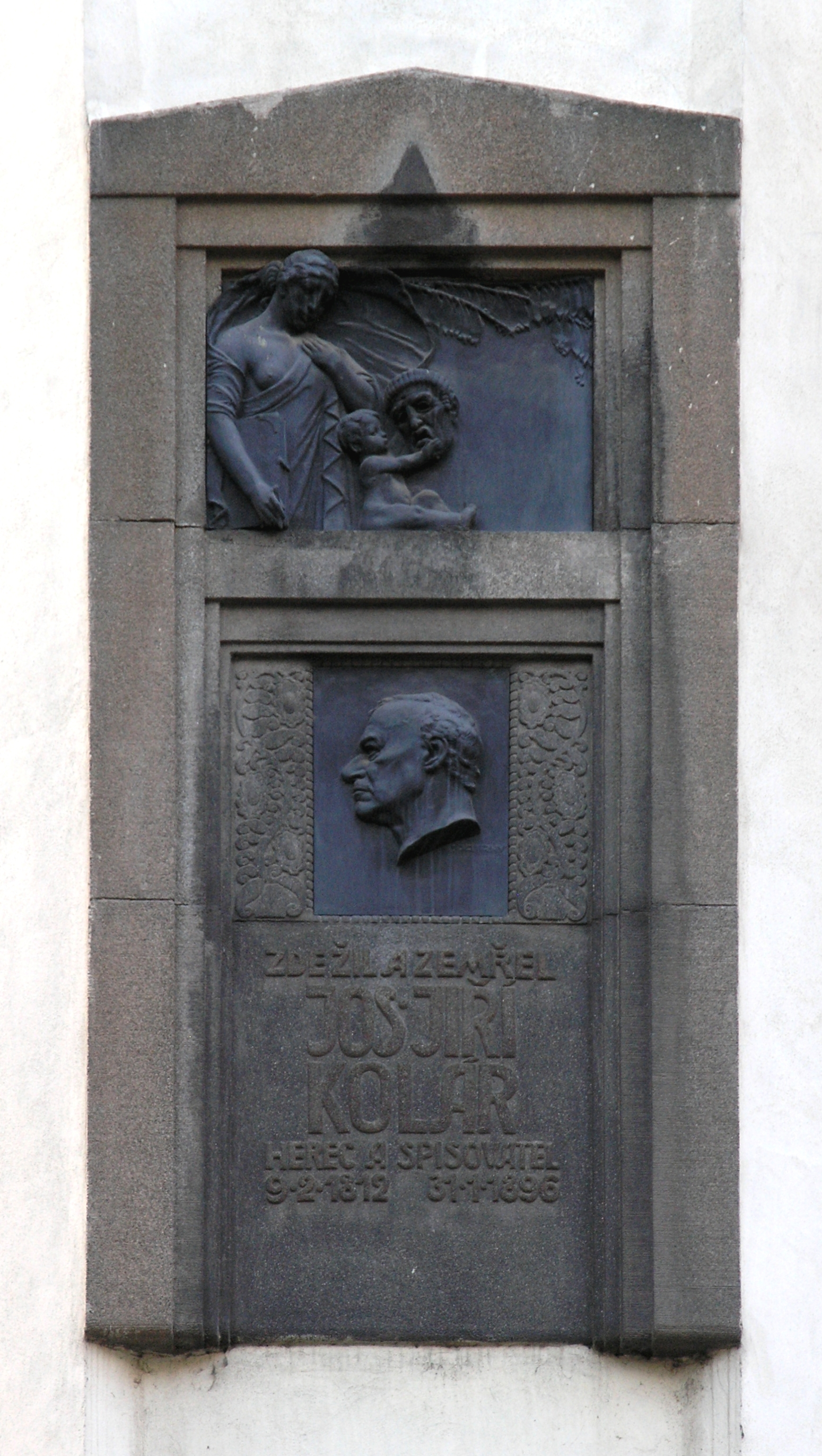 Praha, Nové Město - ulice Na Zderaze